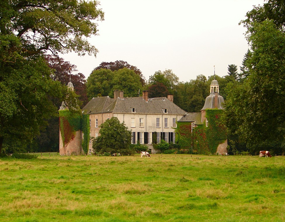 Kasteel Hackfort te Vorden, Gelderland